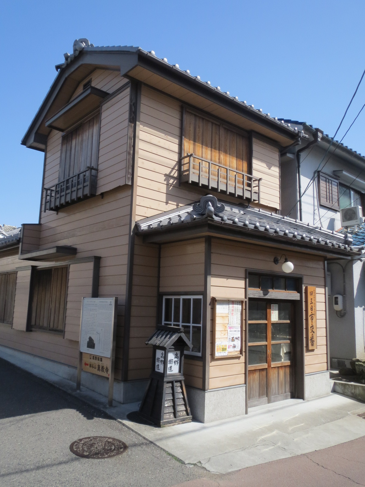 河内長野市指定文化財